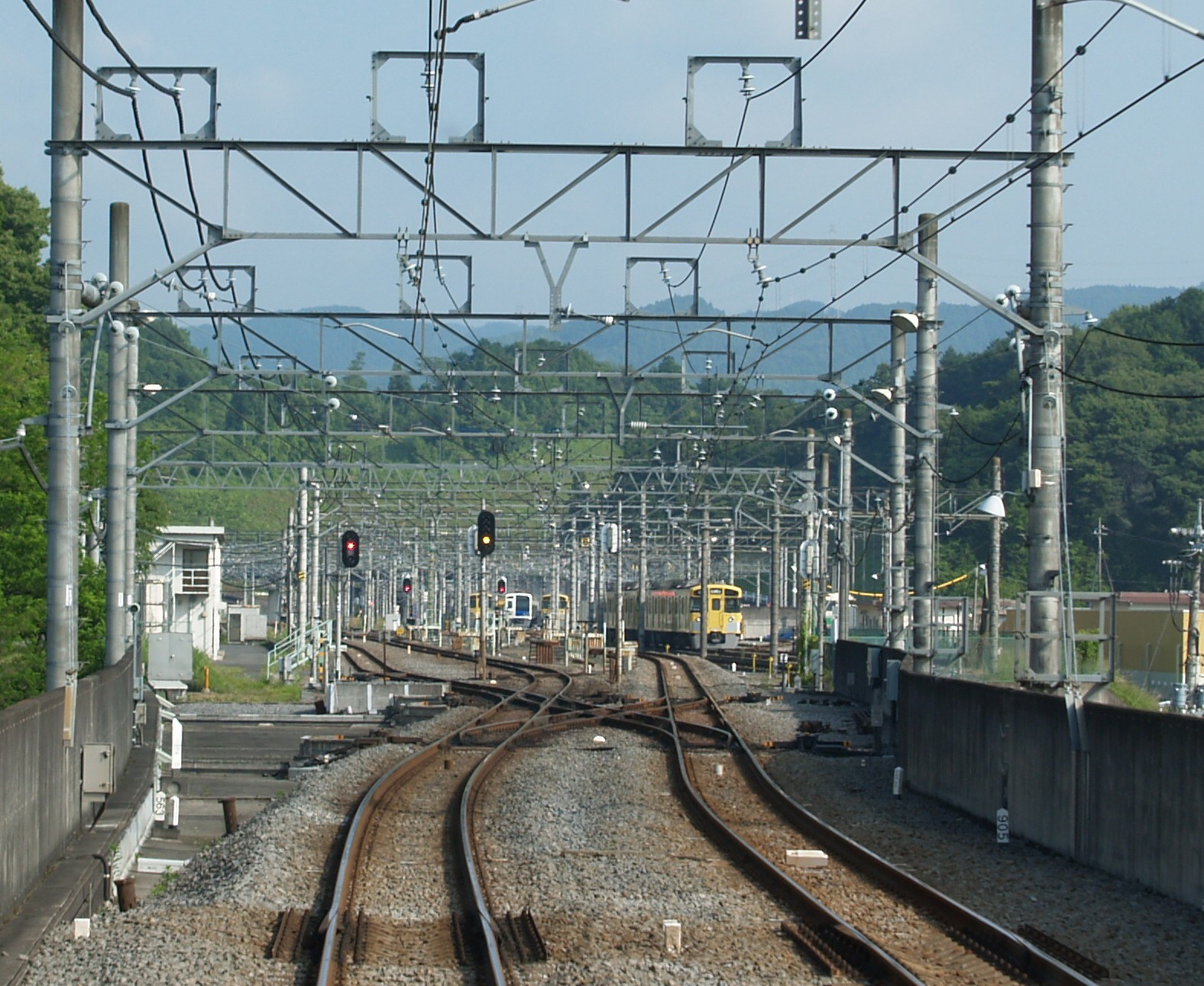 武蔵丘信号所（東飯能方から撮影）